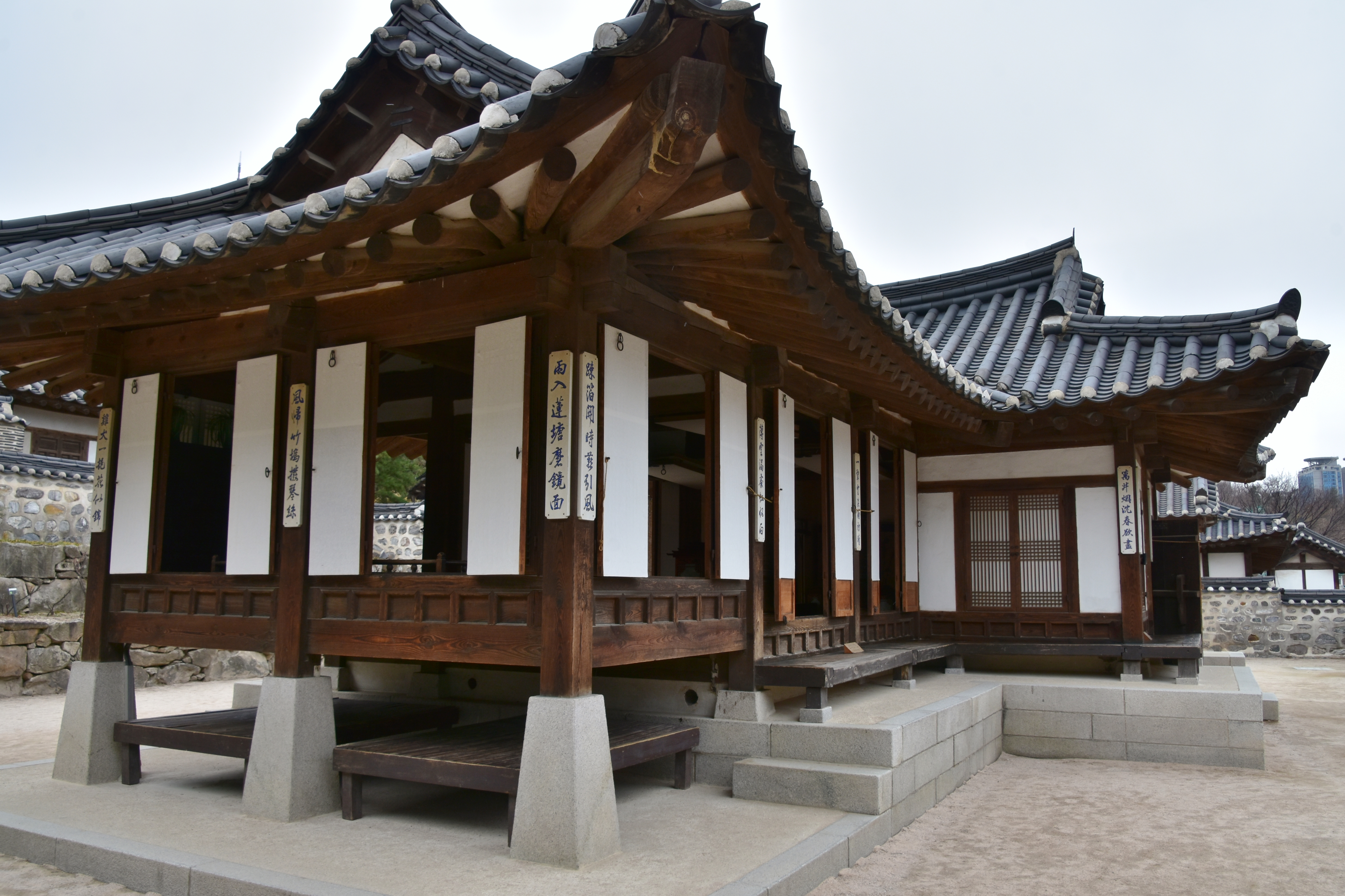 Namsangol Hanok Village, Seoul (48)